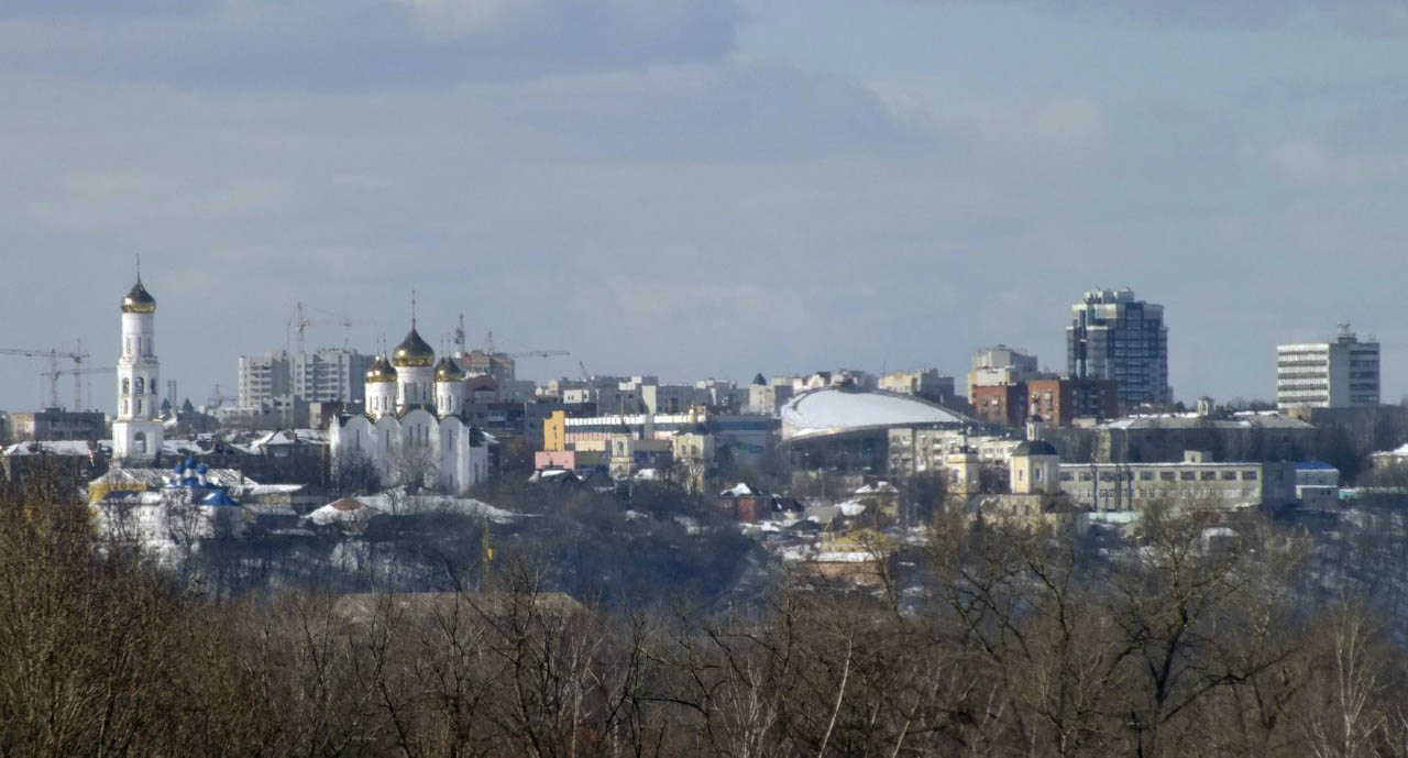 Брянск. Вид на Петровскую гору из Фокинского района